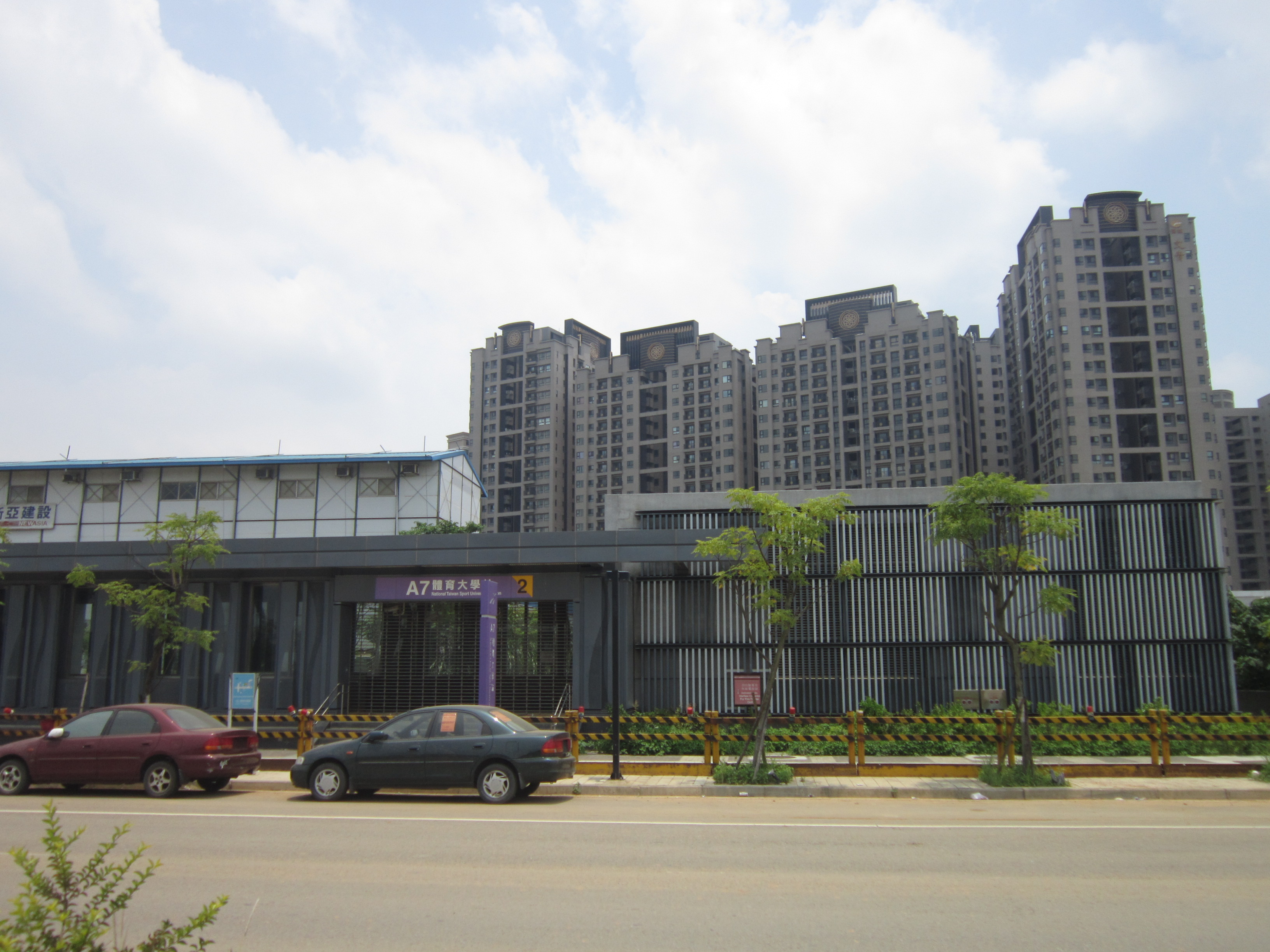 中文（台灣）: 桃園機場捷運體育大學站二號出口，後方是A7合宜住宅